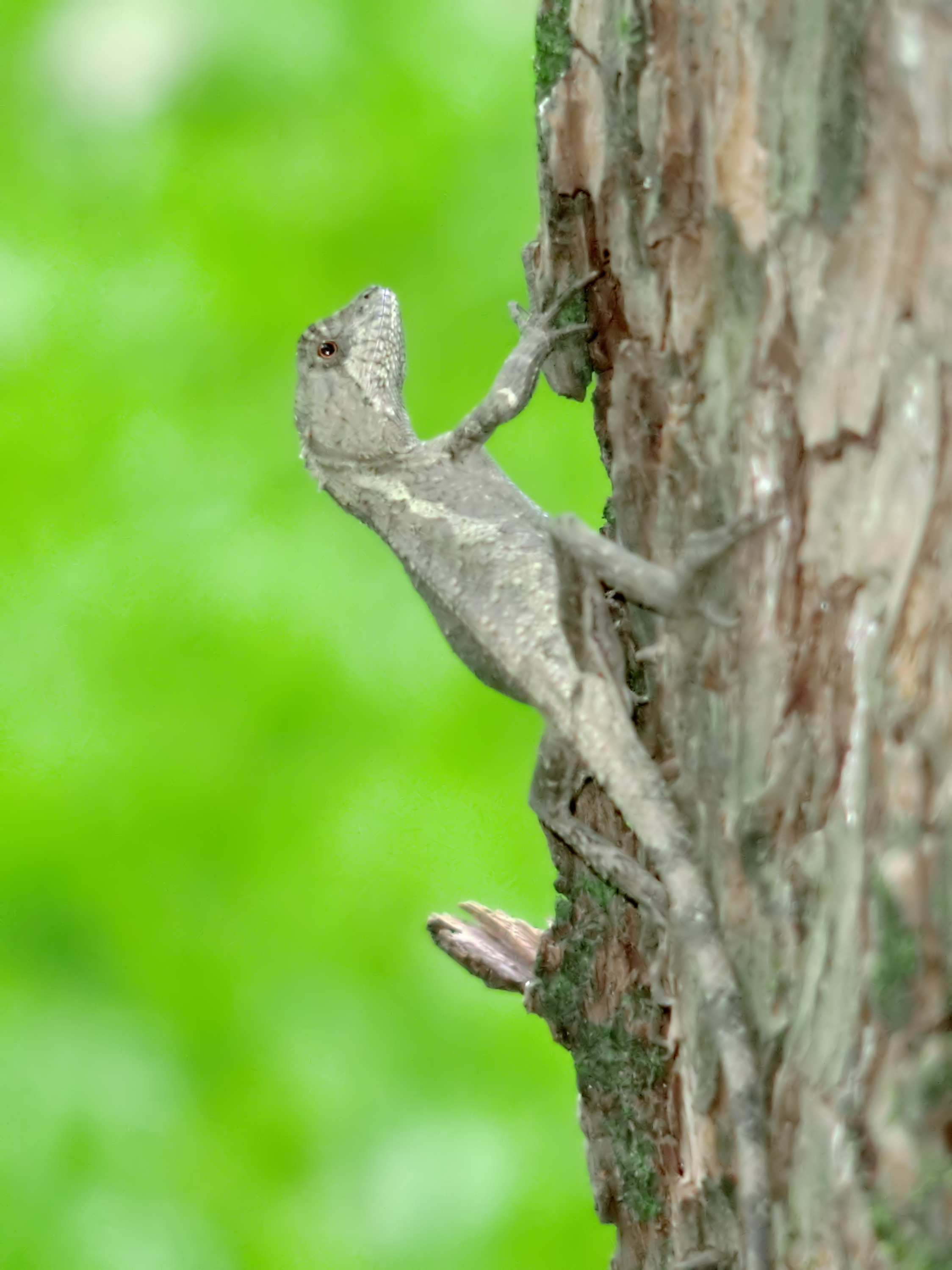 Saw at a park of Taiwan